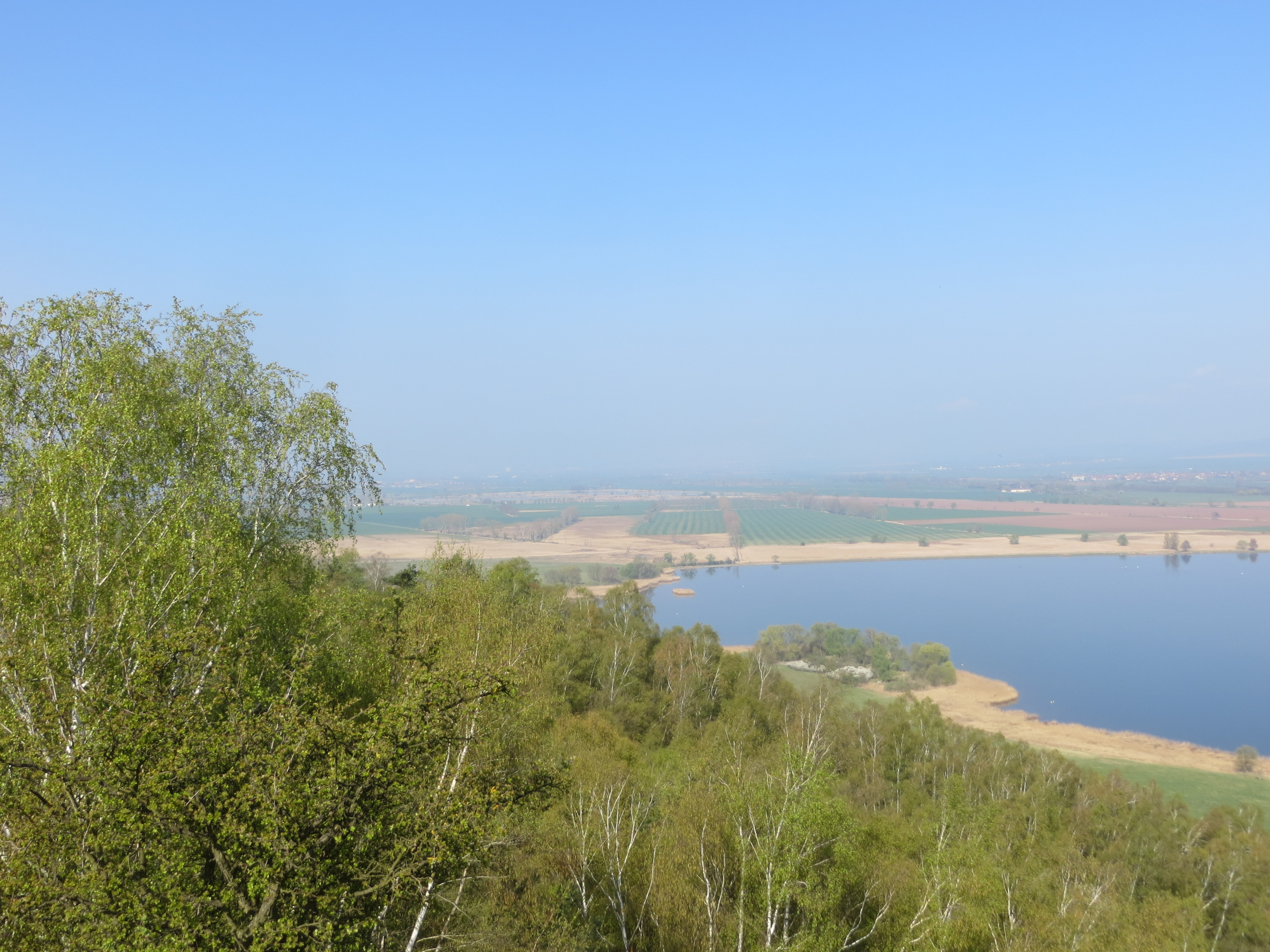 Blick von der Osterkippe zum westlichen Stausee